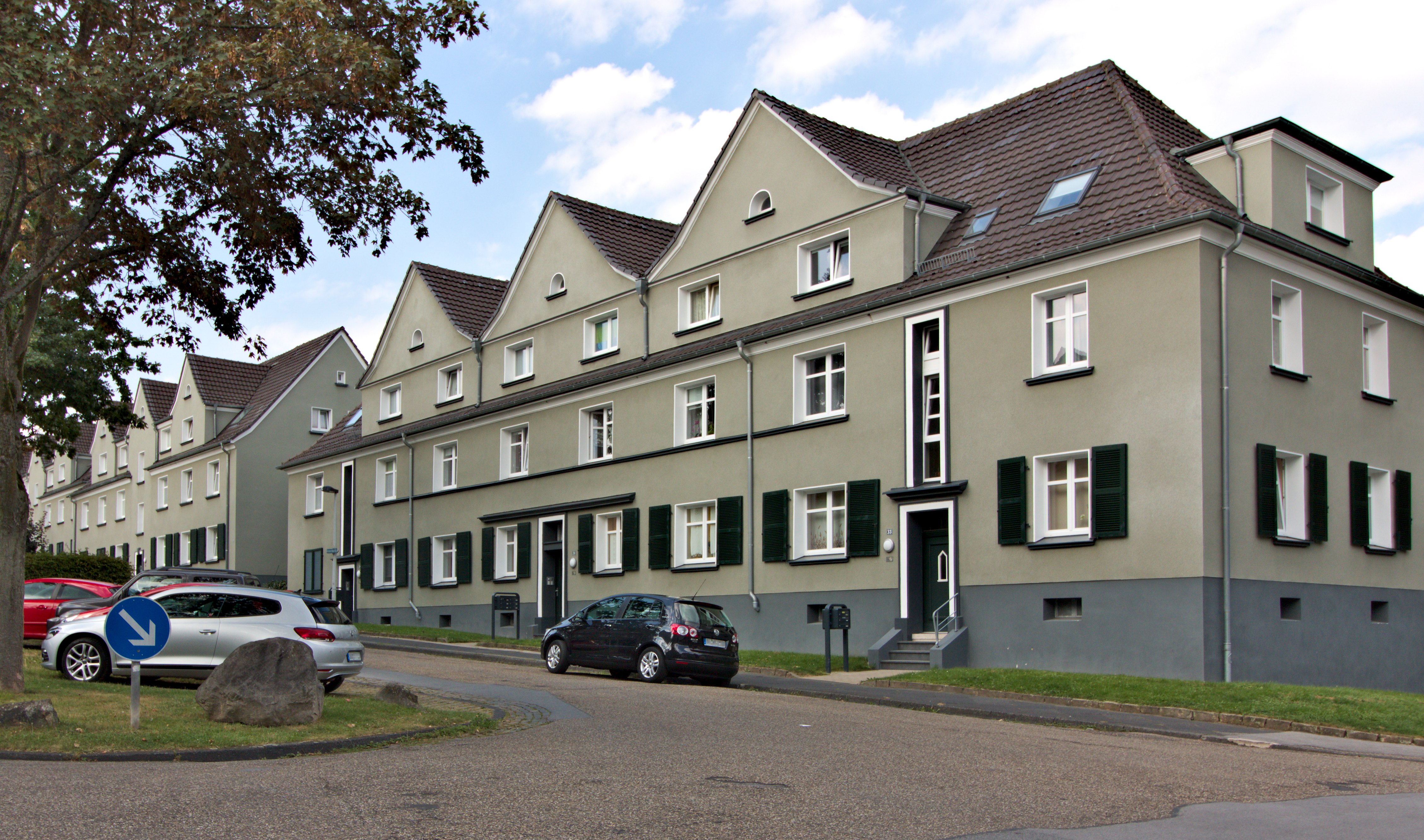 Wohnhäuser entlang des zentralen Platzes der Großwohnsiedlung Weegerhof, Hermann-Meyer-Straße, Solingen-Höhscheid